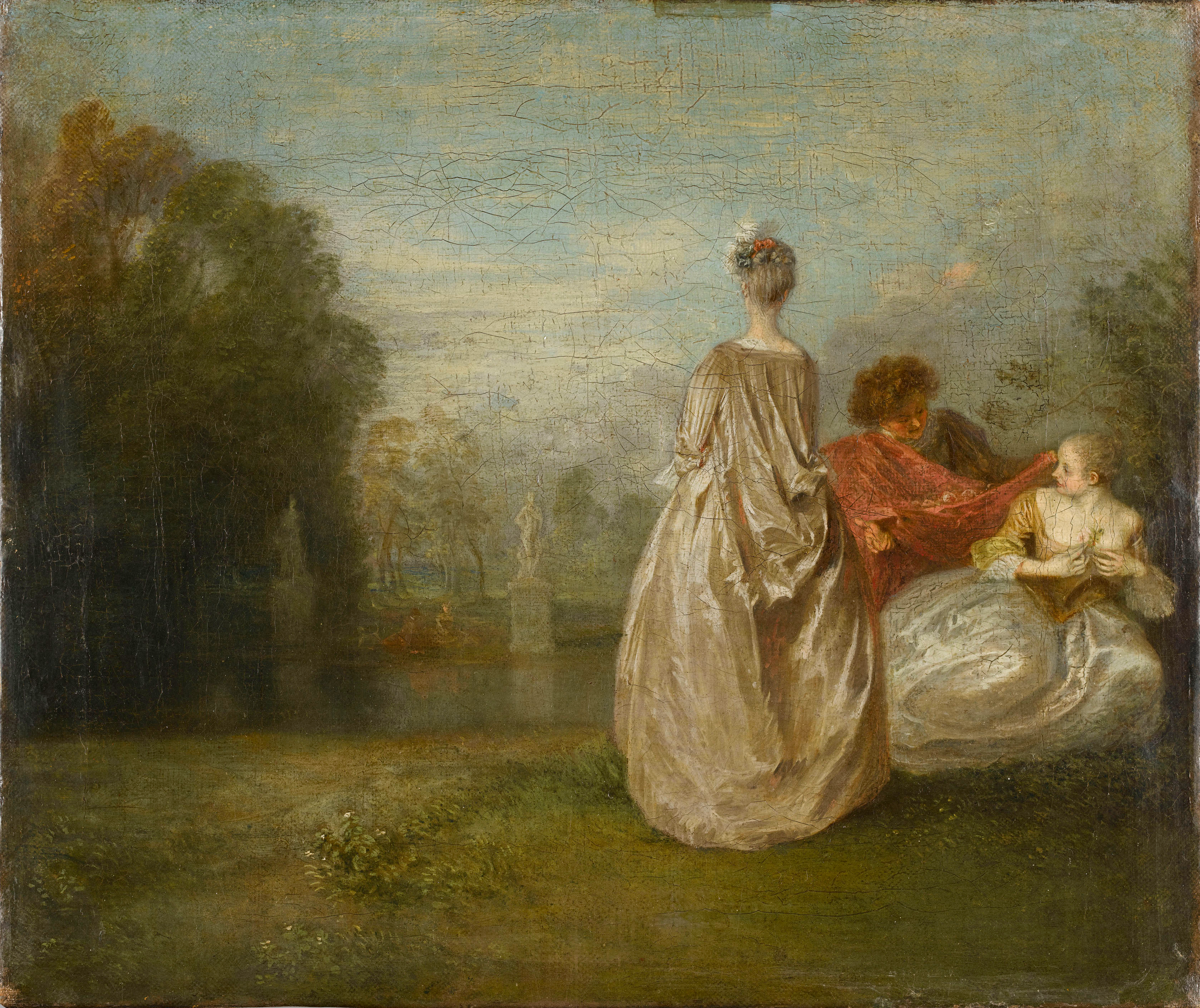 0,30*0,36m